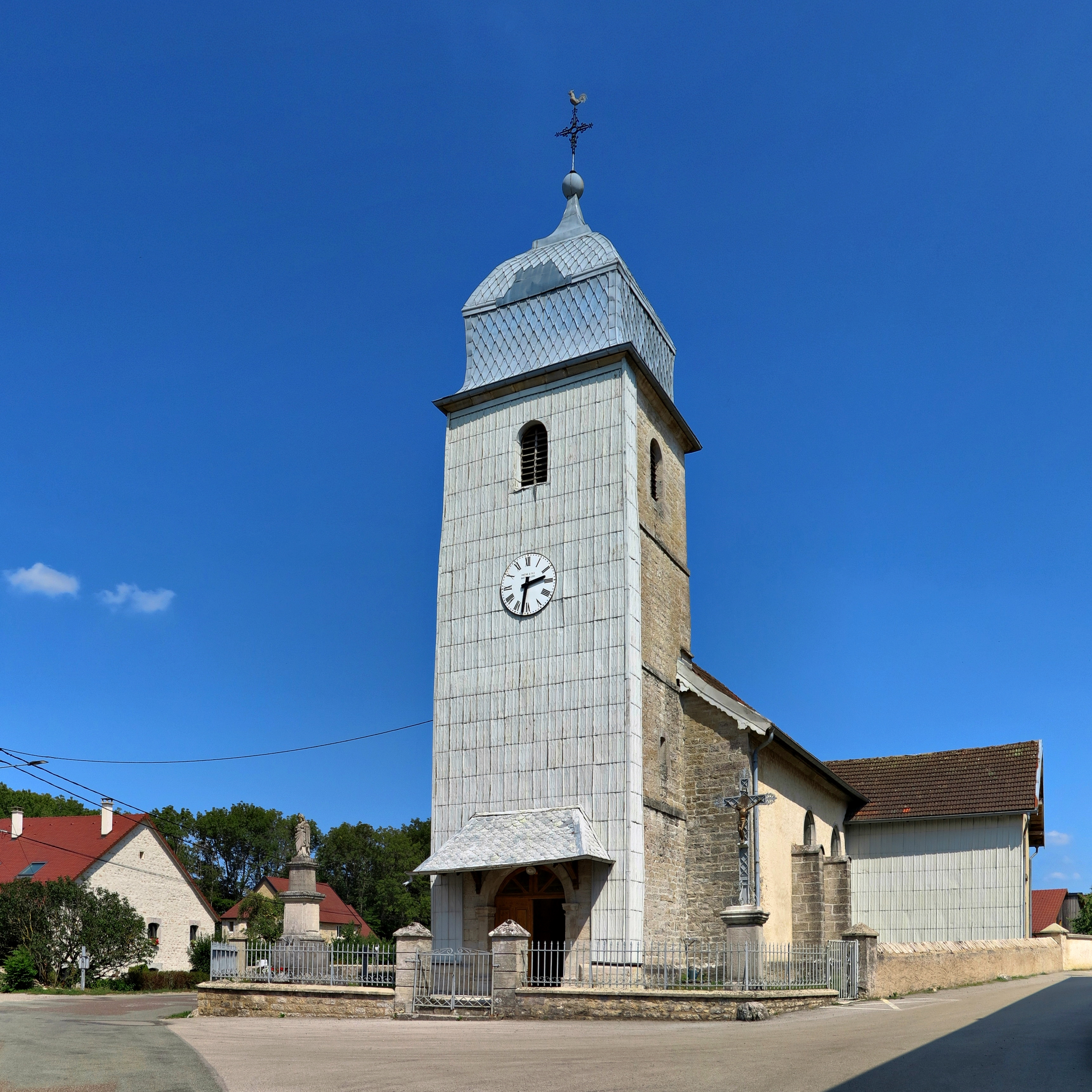 L'église